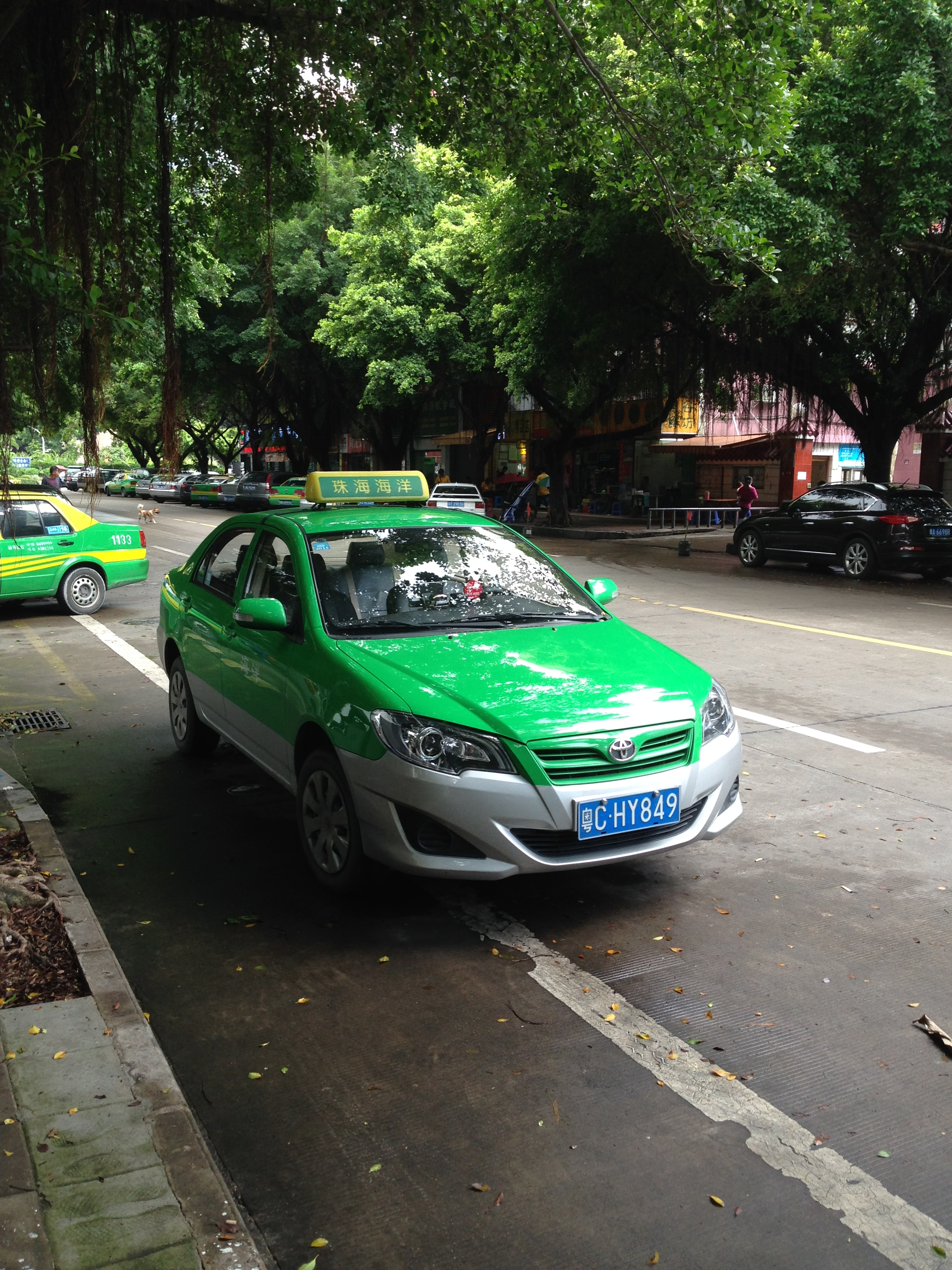 中文（中国大陆）: 珠海丰田出租车